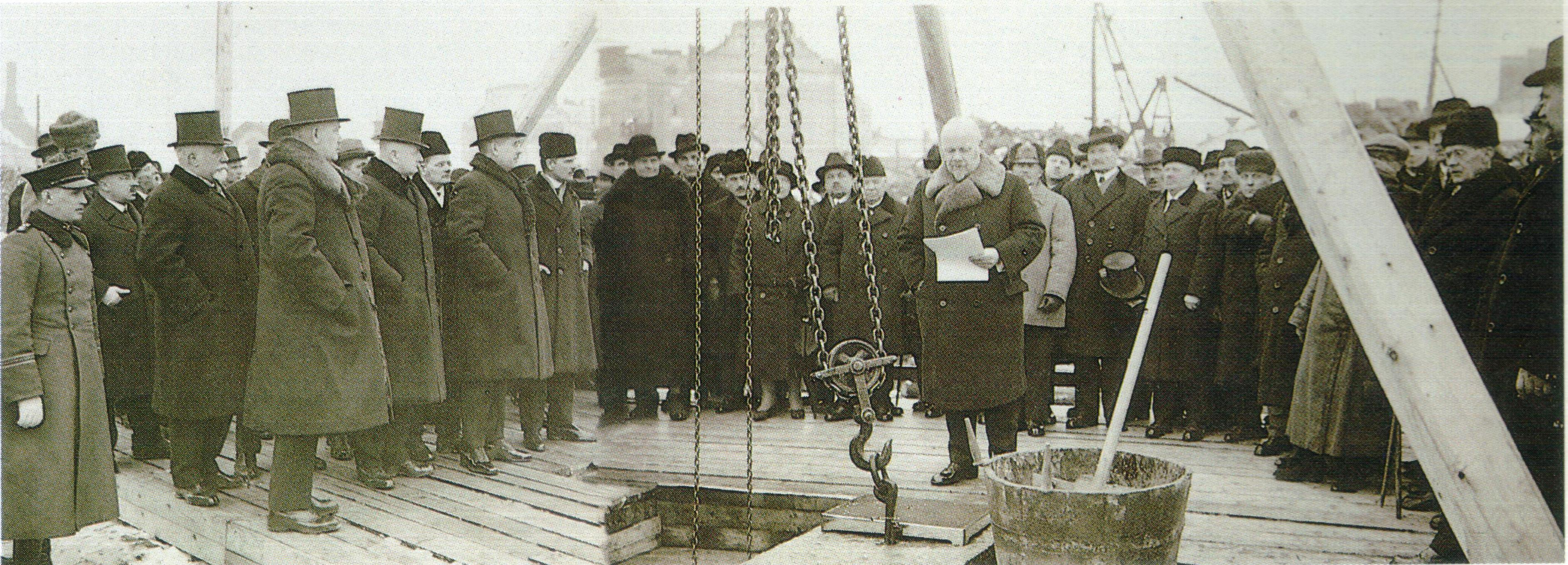 Eduskuntatalon peruskiven muuraus. Puhumassa Wäinö Wuolijoki, vasemmalla edessä tasavallan presidentti Lauri Kristian Relander.